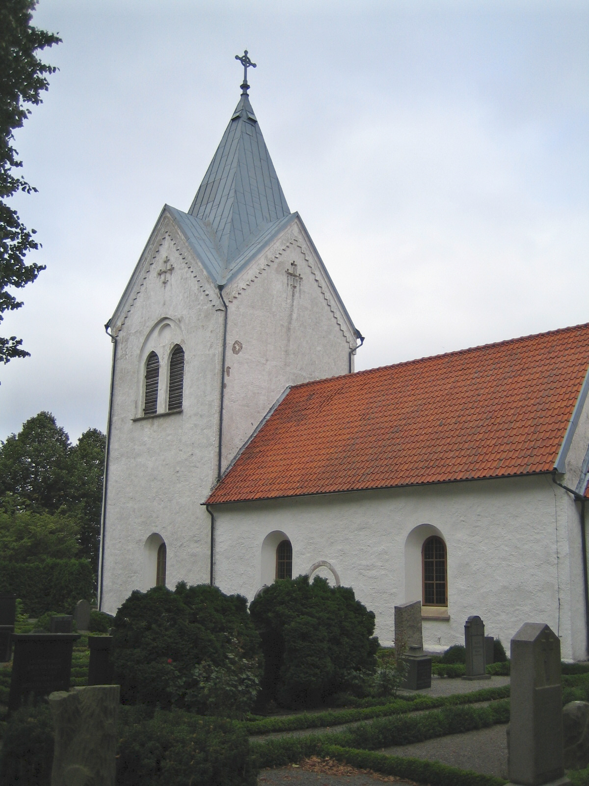 Västra Nöbbelövs kyrka. Bilden tagen av mig själv 11 september 2005.